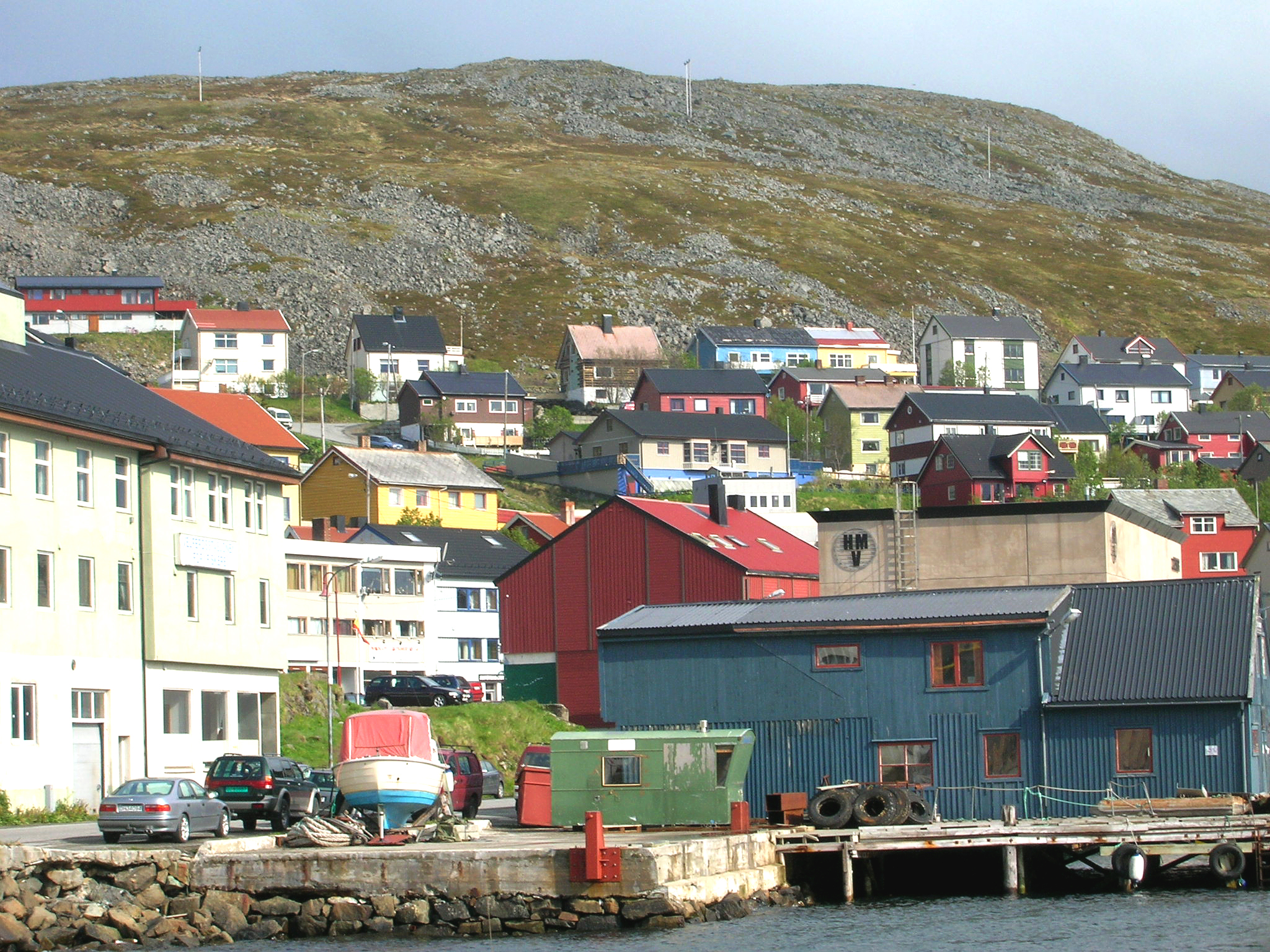 D'Uertschaft Honningsvag (2006)